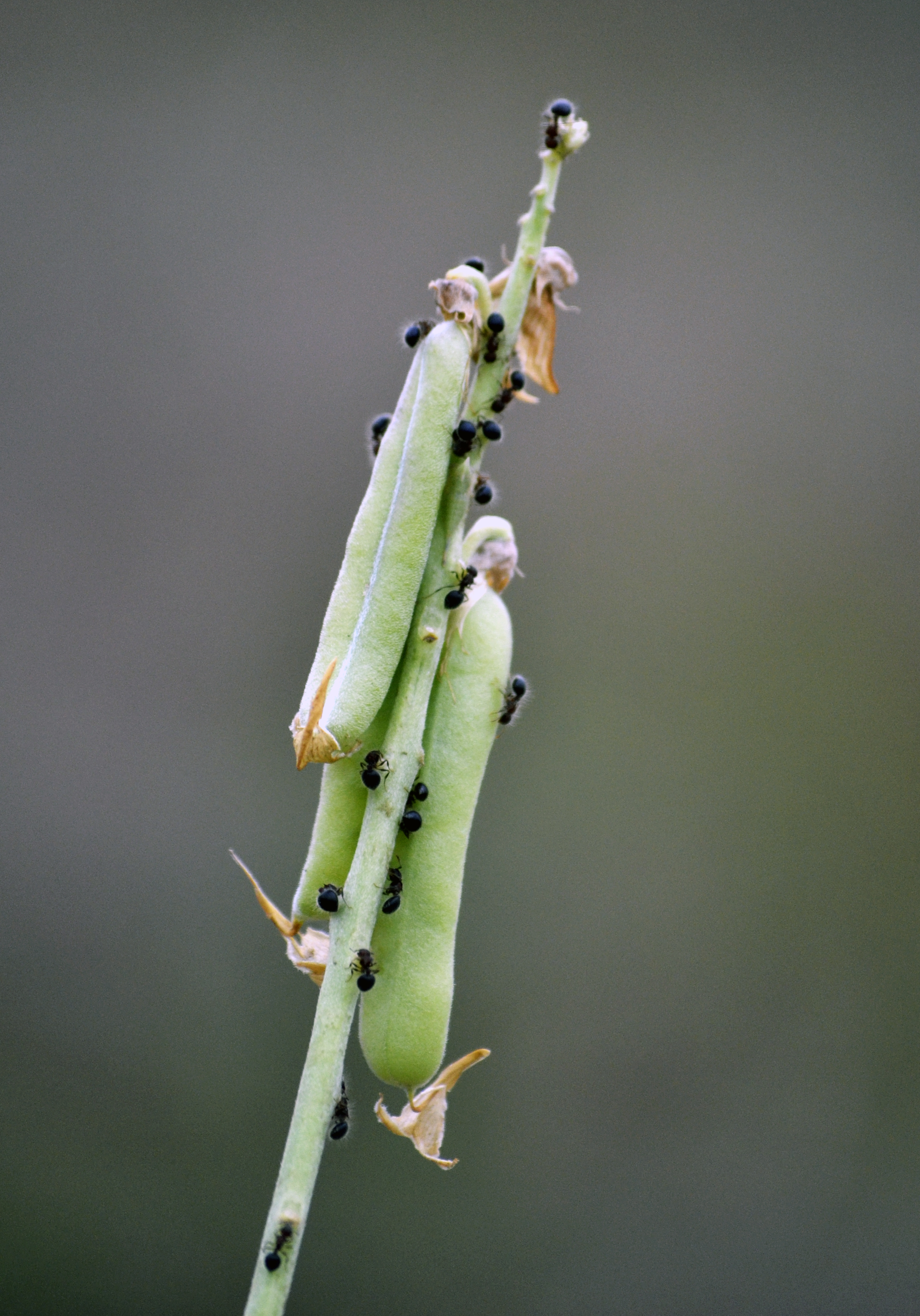 കിലുകിലുപ്പയുടെ കായ